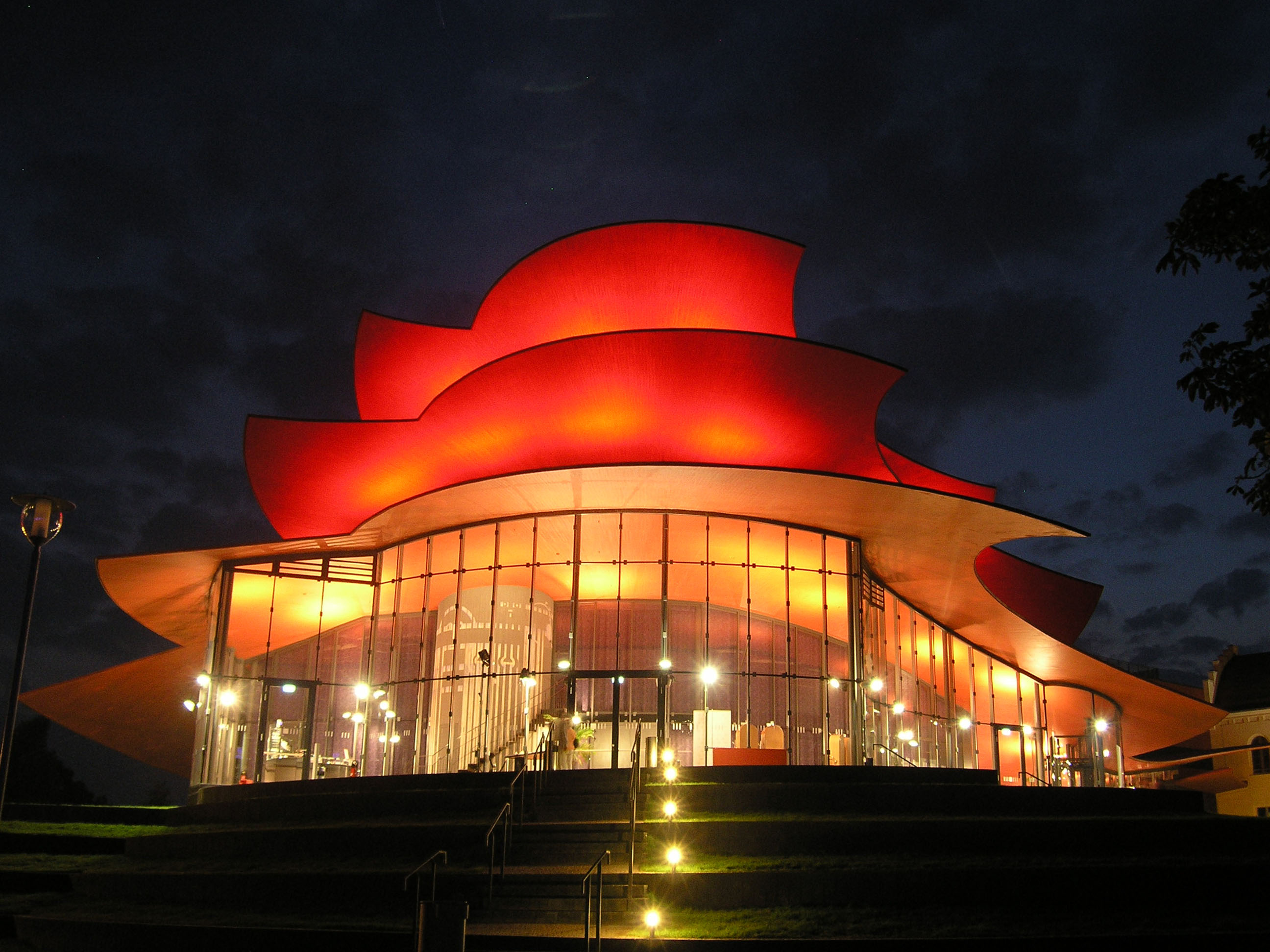 Hans Otto Theater, Potsdam, an einem Herbstabend